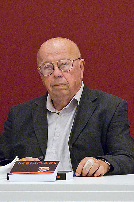 Predstavljanje knjiga »Tko mi zabranjuje kolumne?« novinara i publicista Tihomira Dujmovića, zajedno s »Memoarima« prof. dr. Zdravka Tomca